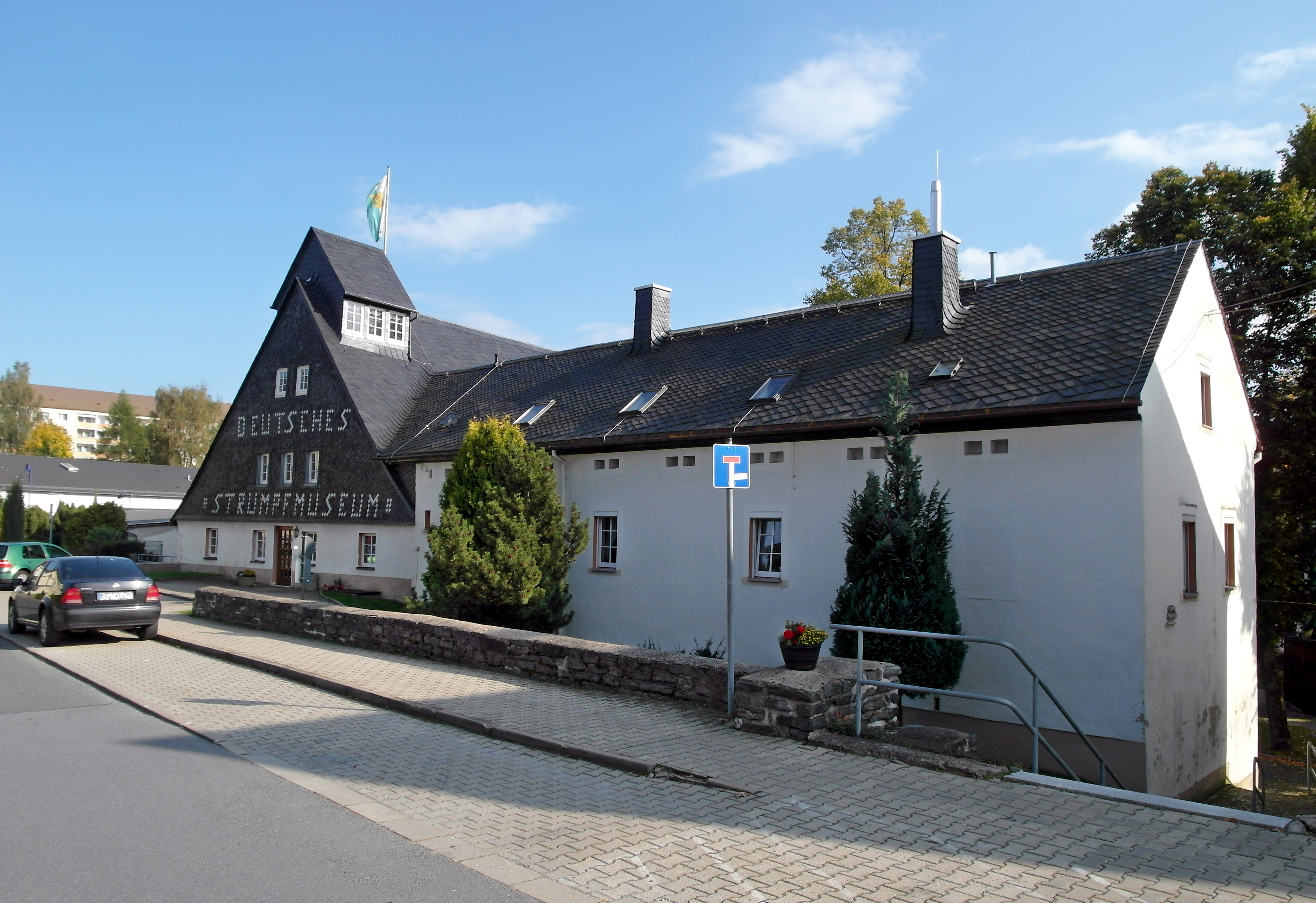 29.09.2017 09423 Gelenau/Erzgebirge, Rathausplatz 1: Das ehemalige Rittergut (GMP: 50.713412,12.983092) beherbergt auch das Deutsche Strumpfmuseum. Sicht von der Ernst- Grohmann-Straße (GMP: 50.713733,12.983529). [SAM2234.JPG]20170929500DR.JPG(c)Blobelt